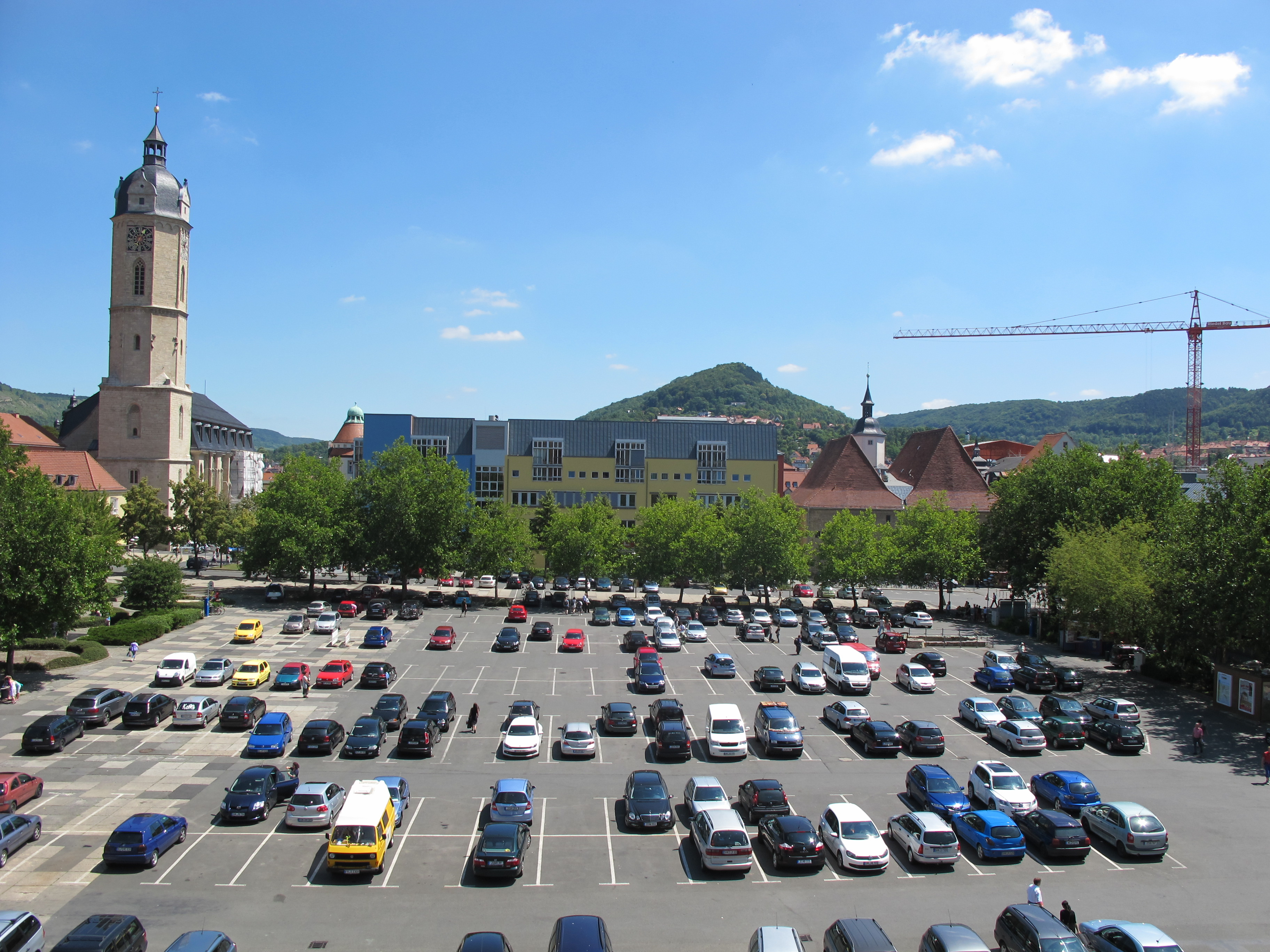 Eichplatz Jena auf einen Blick. Aufgenommen von der Terrase des JenTower.